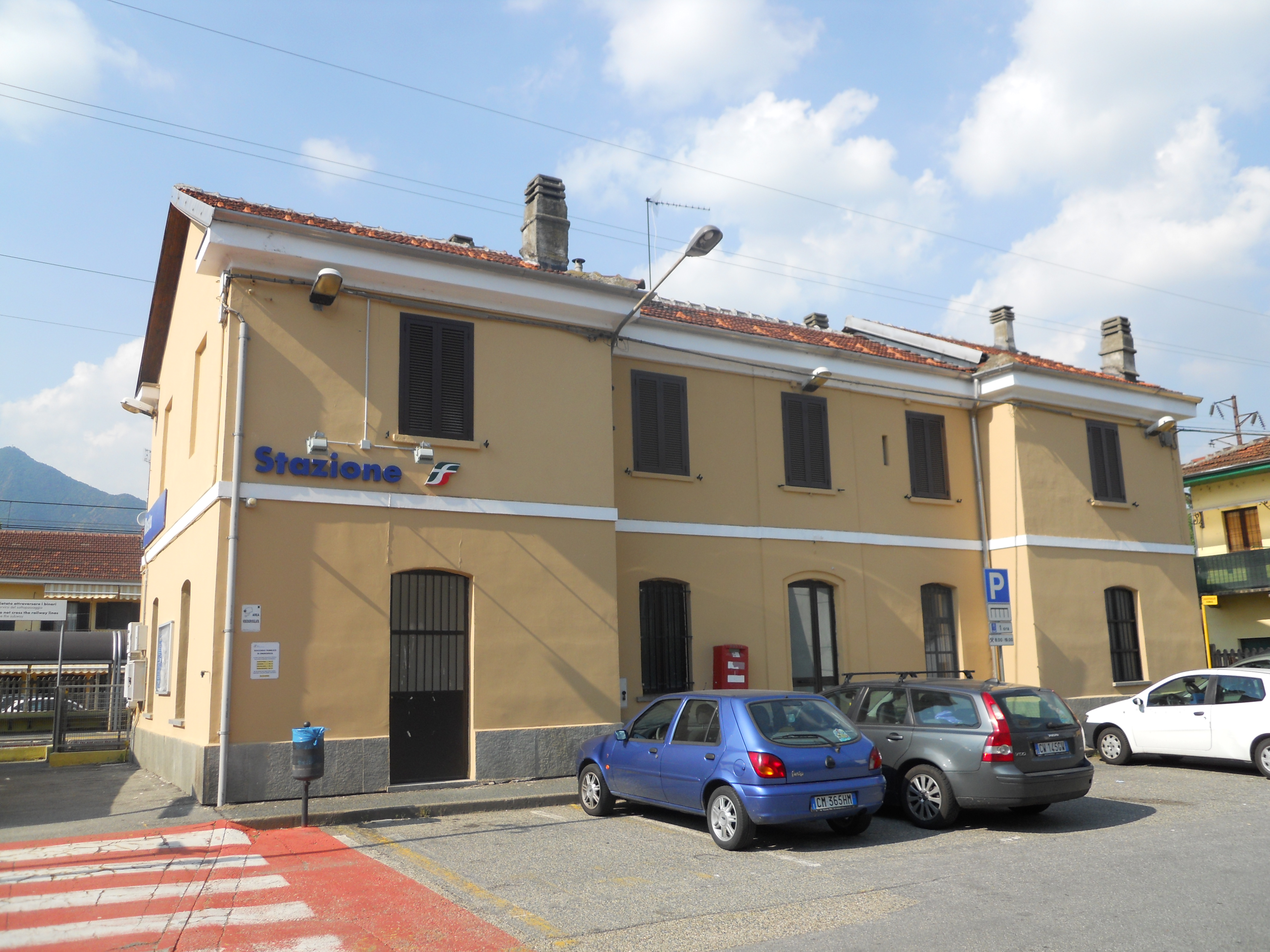 Stazione di Rosta